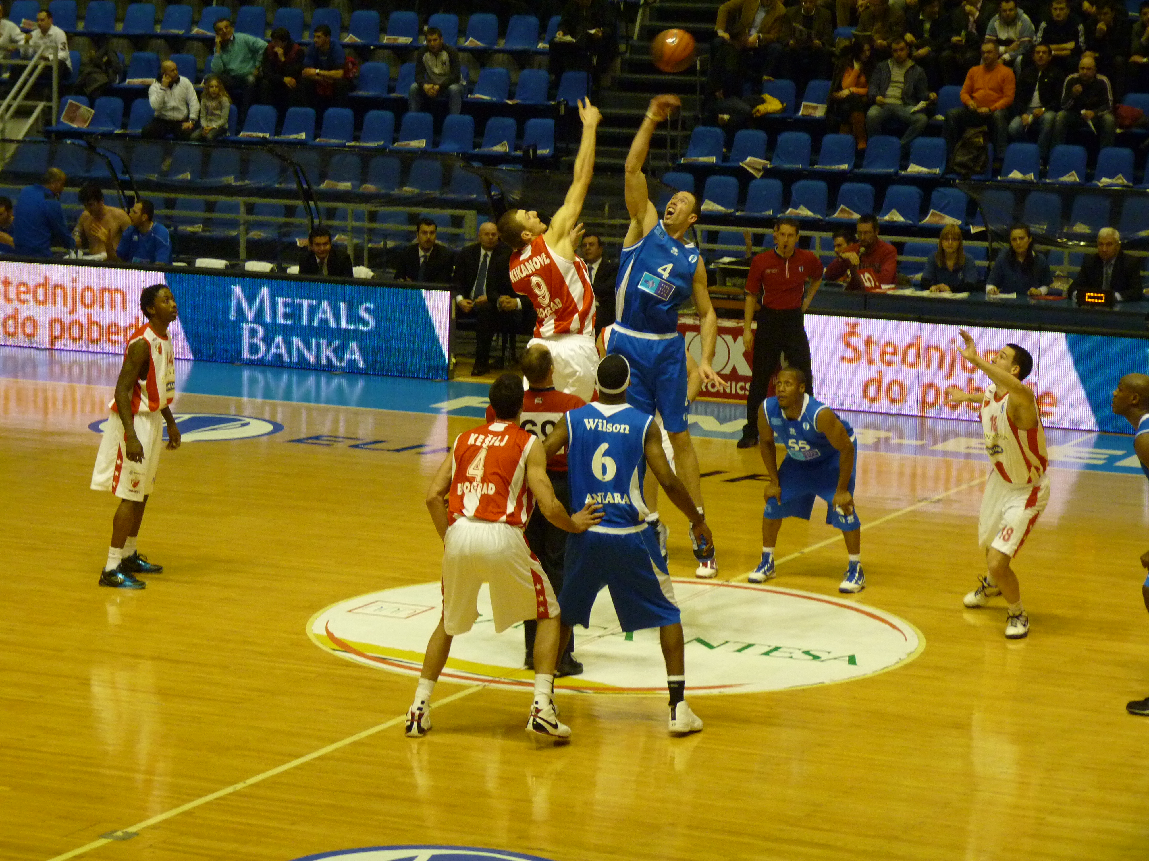 Crvena zvezda